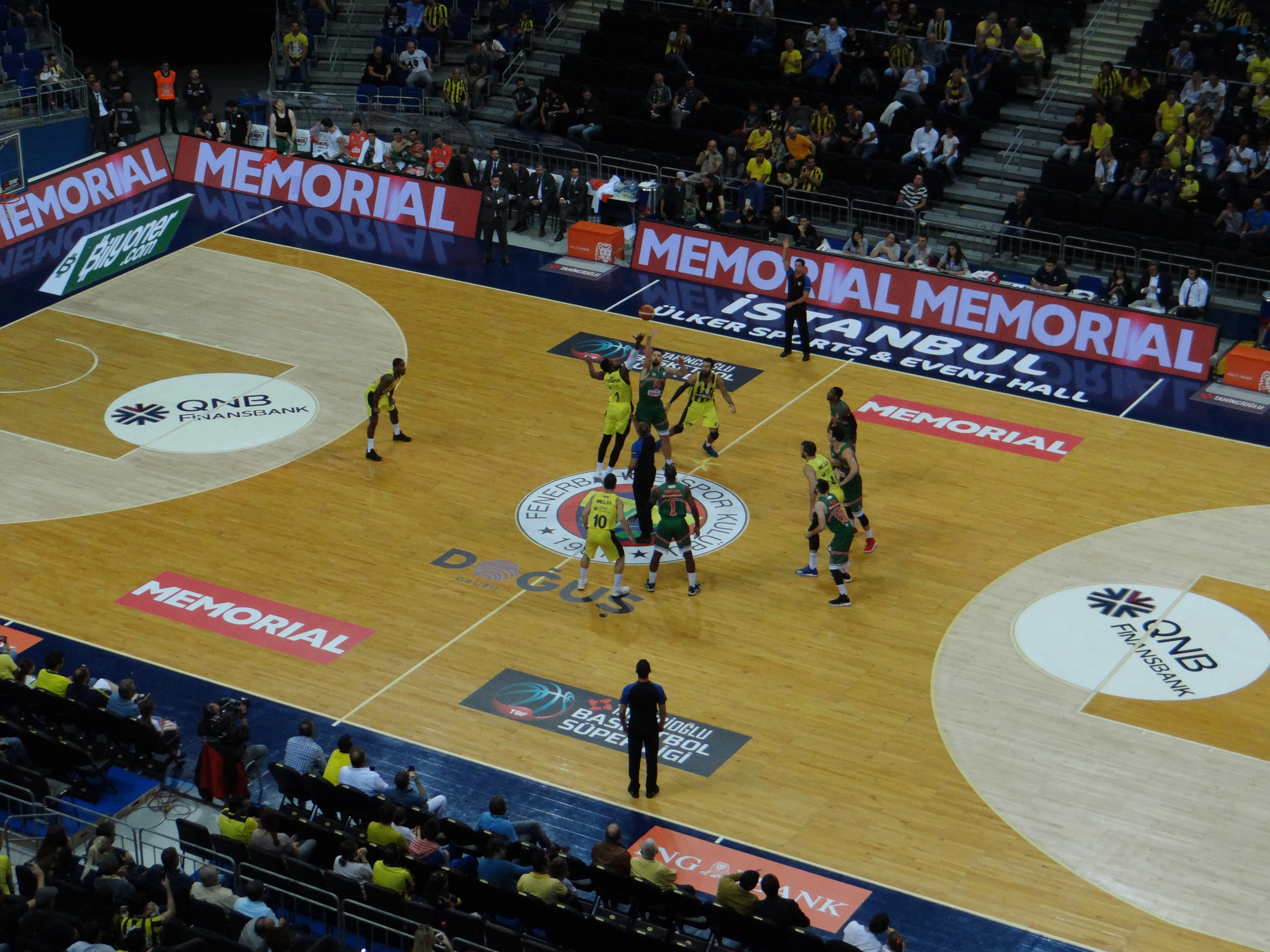 Fenerbahçe Men's Basketball vs Banvit B.K. TSL 20171007